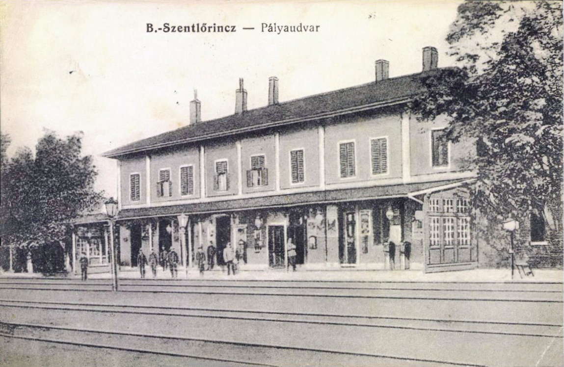 A szentlőrinci vasútállomás 1910-ben, régi képeslap (özv. Tauber Ferenczné kiadása)